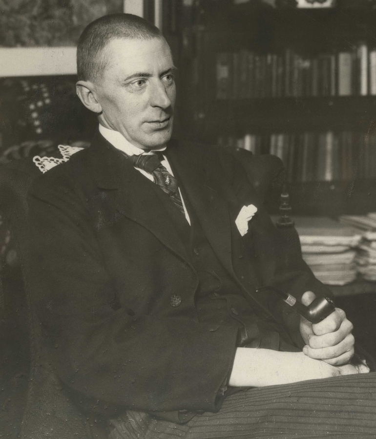 Olaf Nordhagen. Ukjent fotograf, ca. 1920–25. Fra Byhistorisk samling hos Oslo Museum.